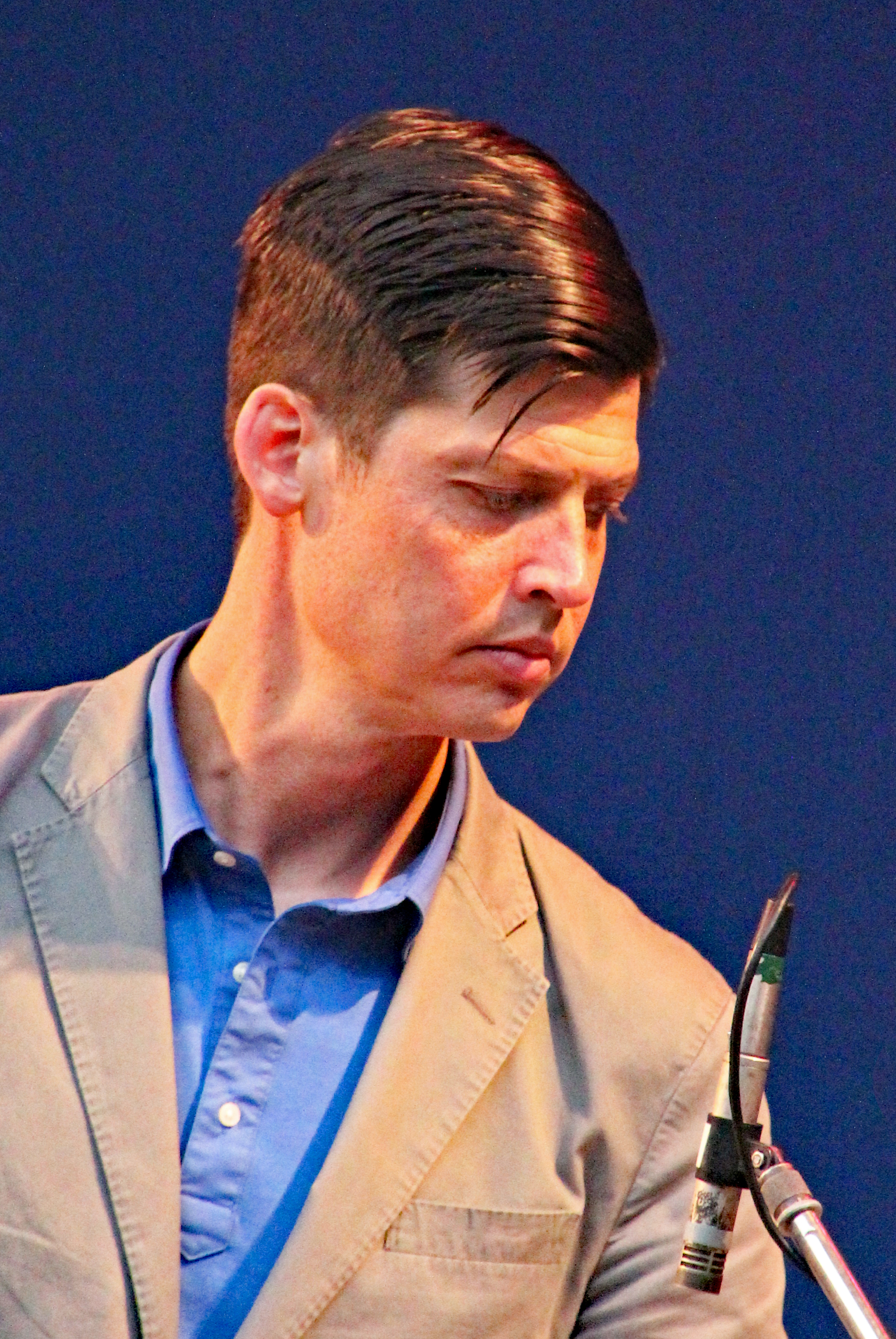 Bildinhalt: Ches Smith bei einem Auftritt im Frankfurter Palmengarten Aufnahmeort: Frankfurt am Main, Deutschland Die dargestellte Person wurde bei einem öffentlichen Auftritt fotografiert.